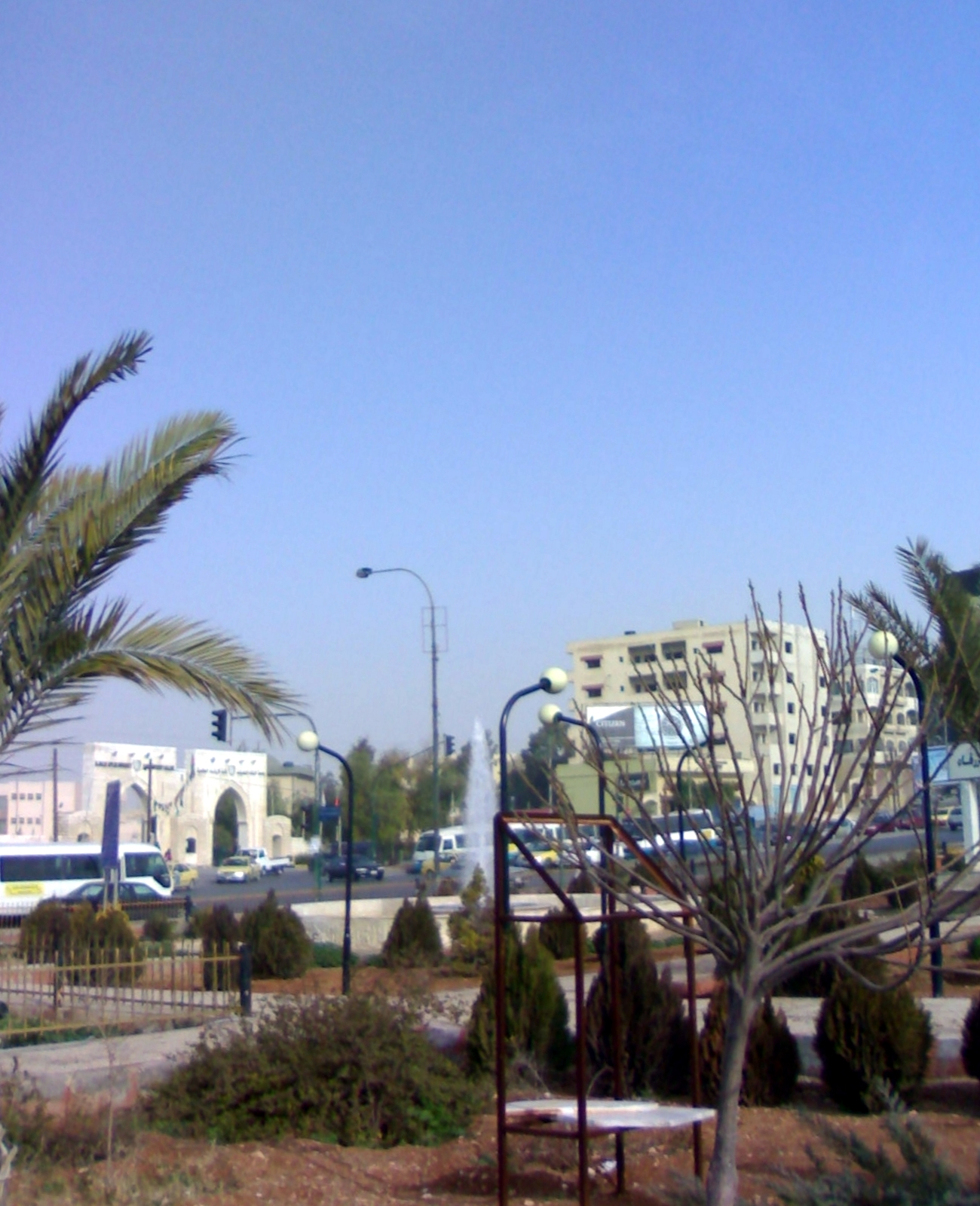 المدخل الأمامي لكلية الزرقاء الحكومية، وجه نظرك نحو الباص وعلى امتداد نظرك تلك هي البوابة الأمامية للكلية